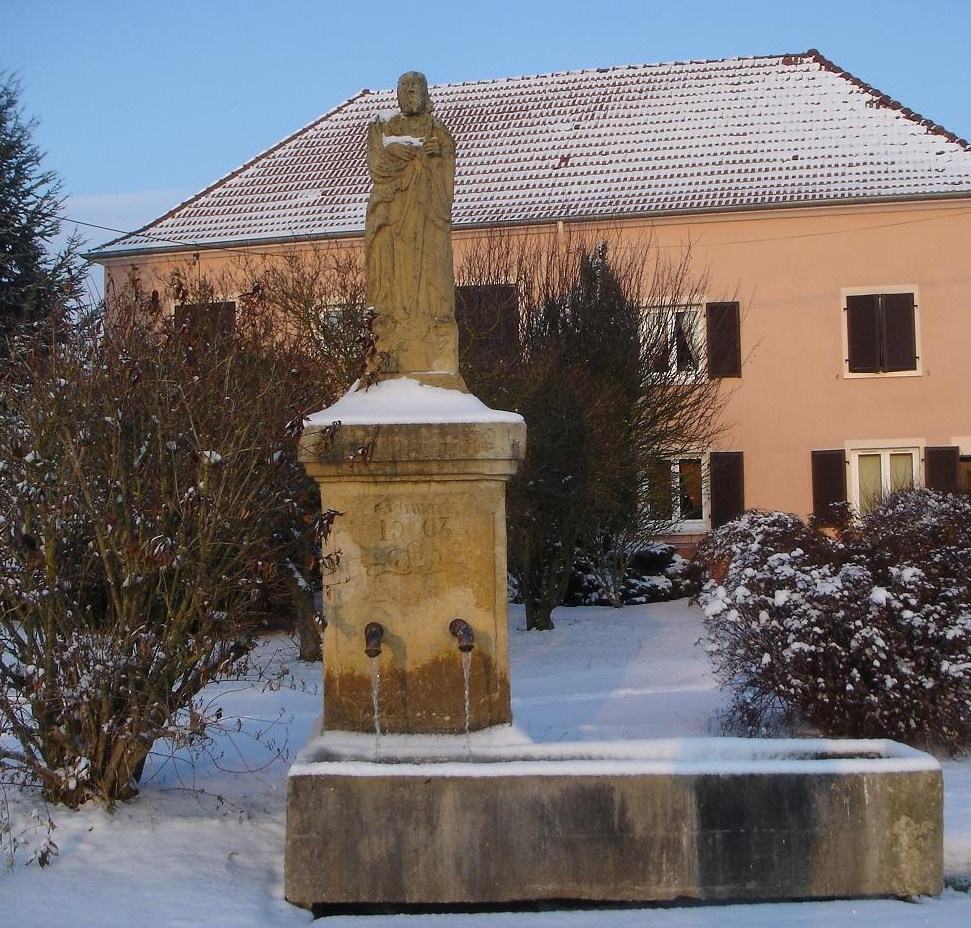 Fontaine de Saint Jacques, France